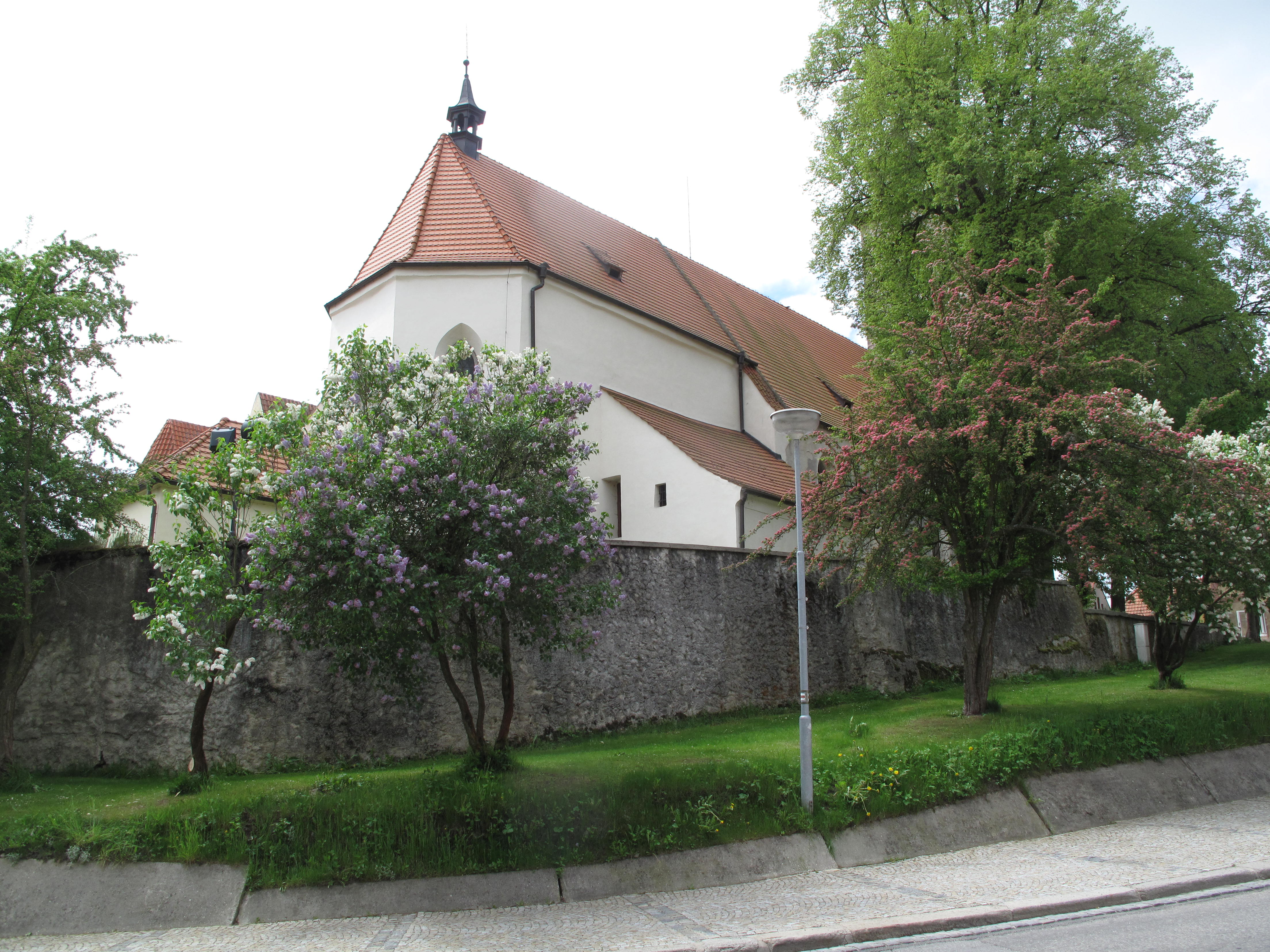 Kaplice, kostel